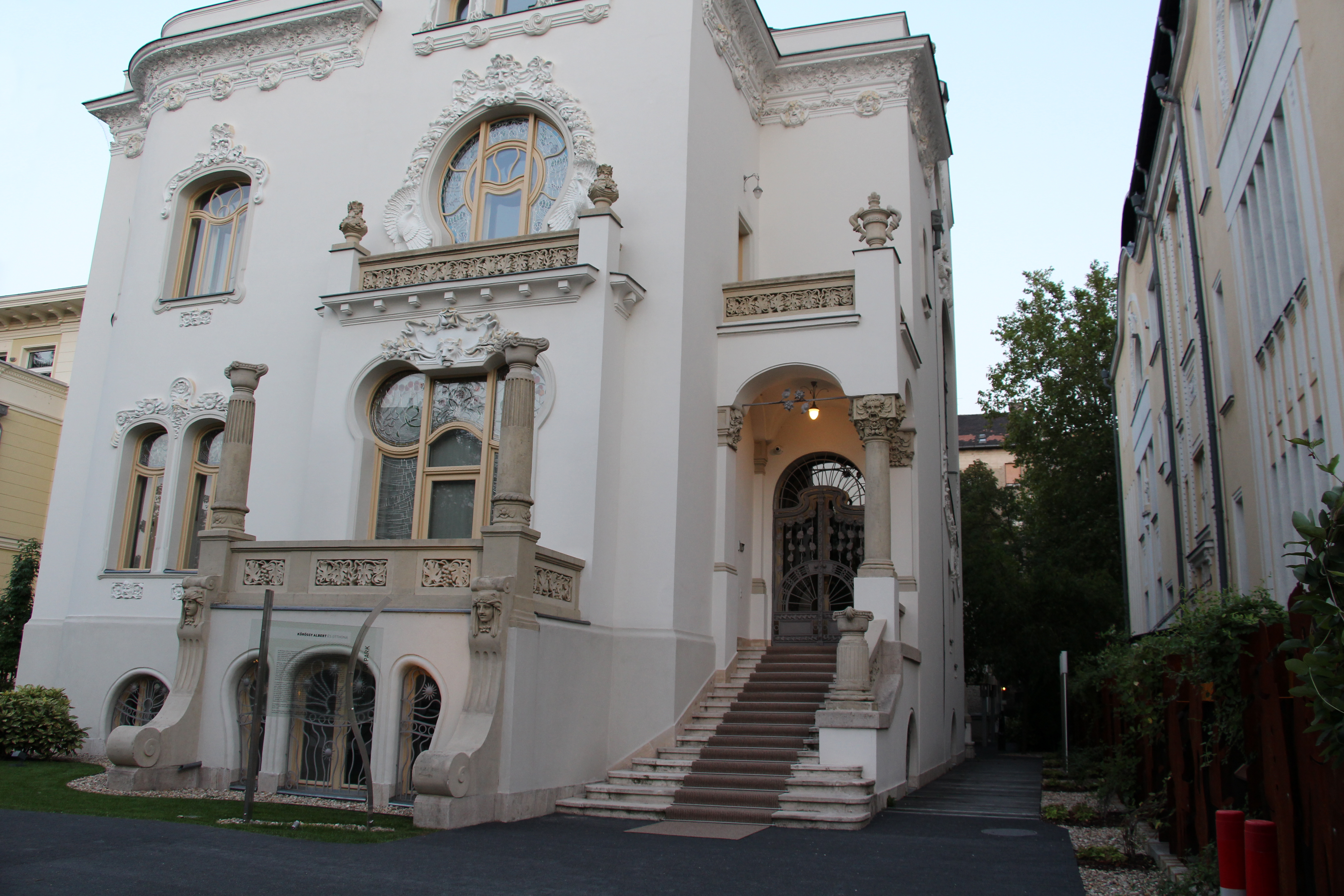 Erzsébetváros - Városligeti fasor Hungarian secession. Arch. Albert Kálmán Kőrössy and Artúr Sebestyén 1899